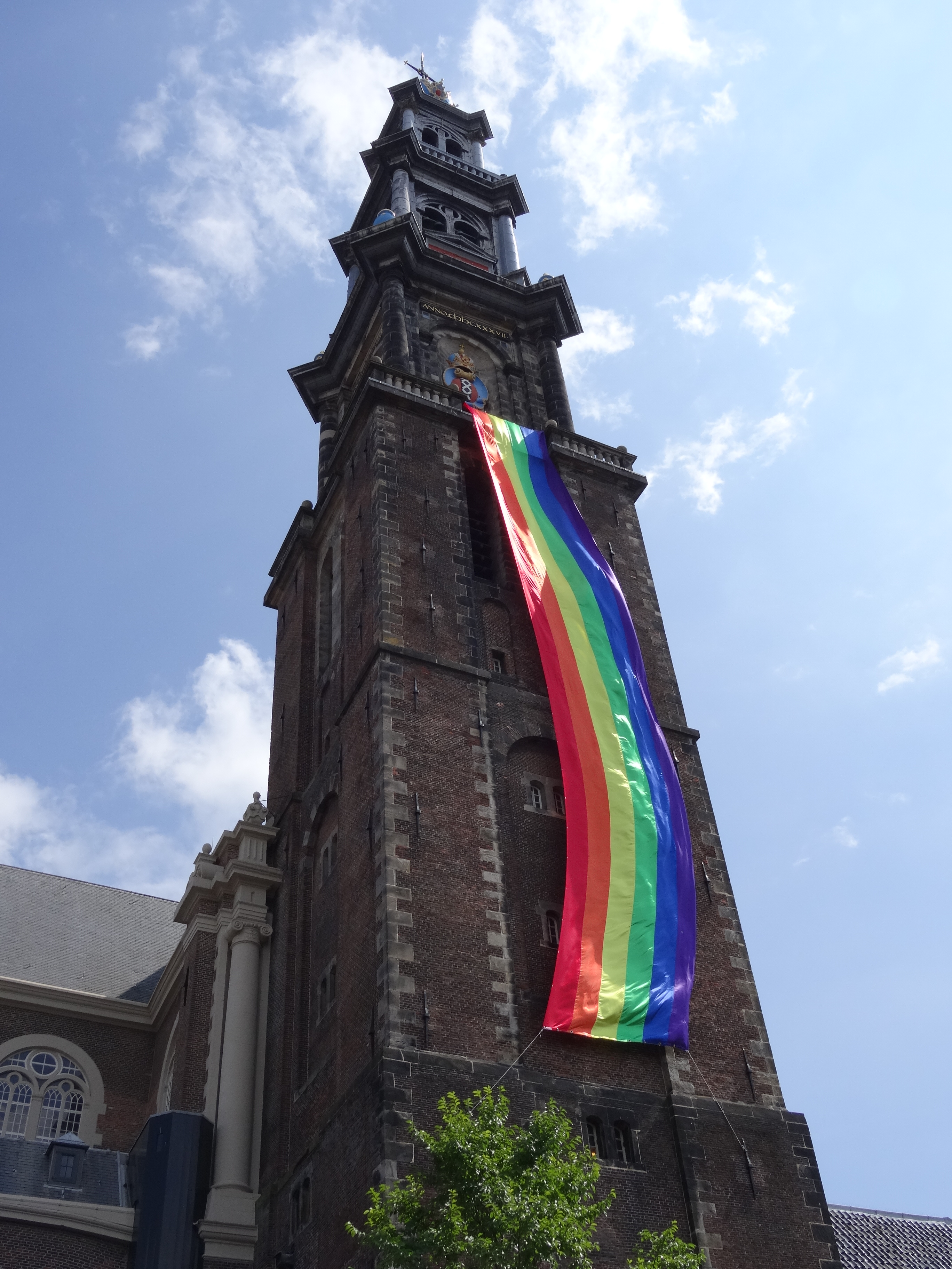 Impression of the Canal Parade at EuroPride in Amsterdam 2016